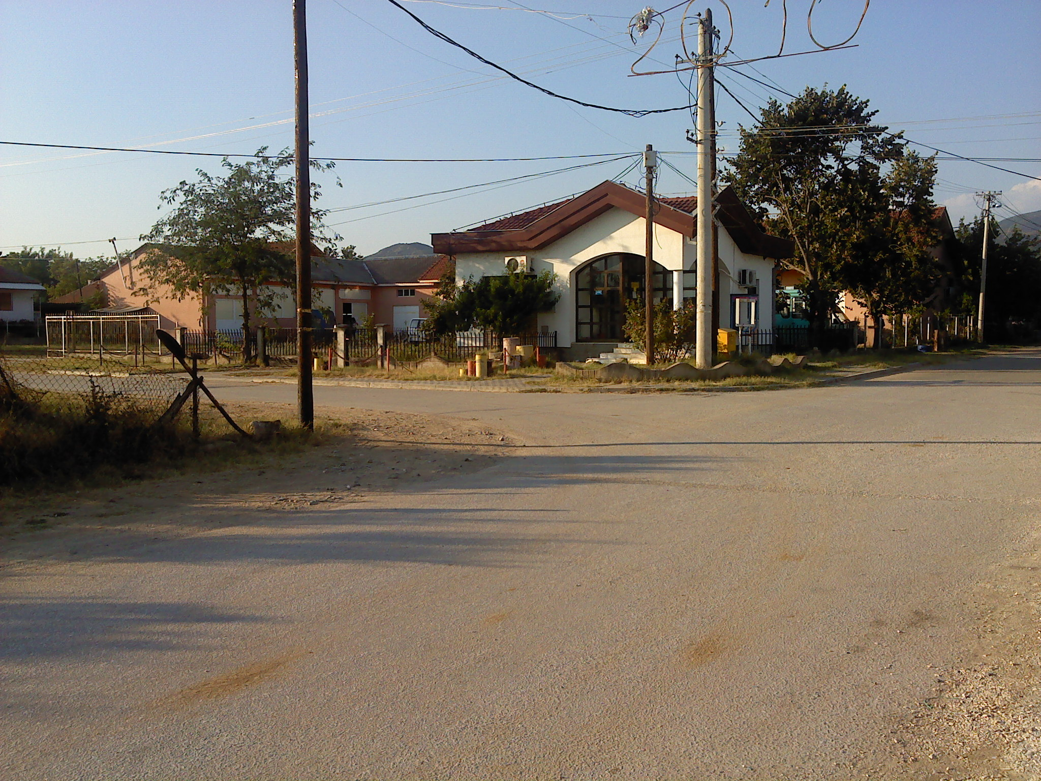 Josifovo Post Office